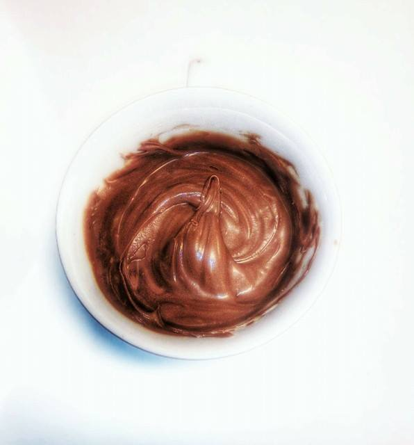 Dette er et bilde av sjokoladepålegg i en skål.